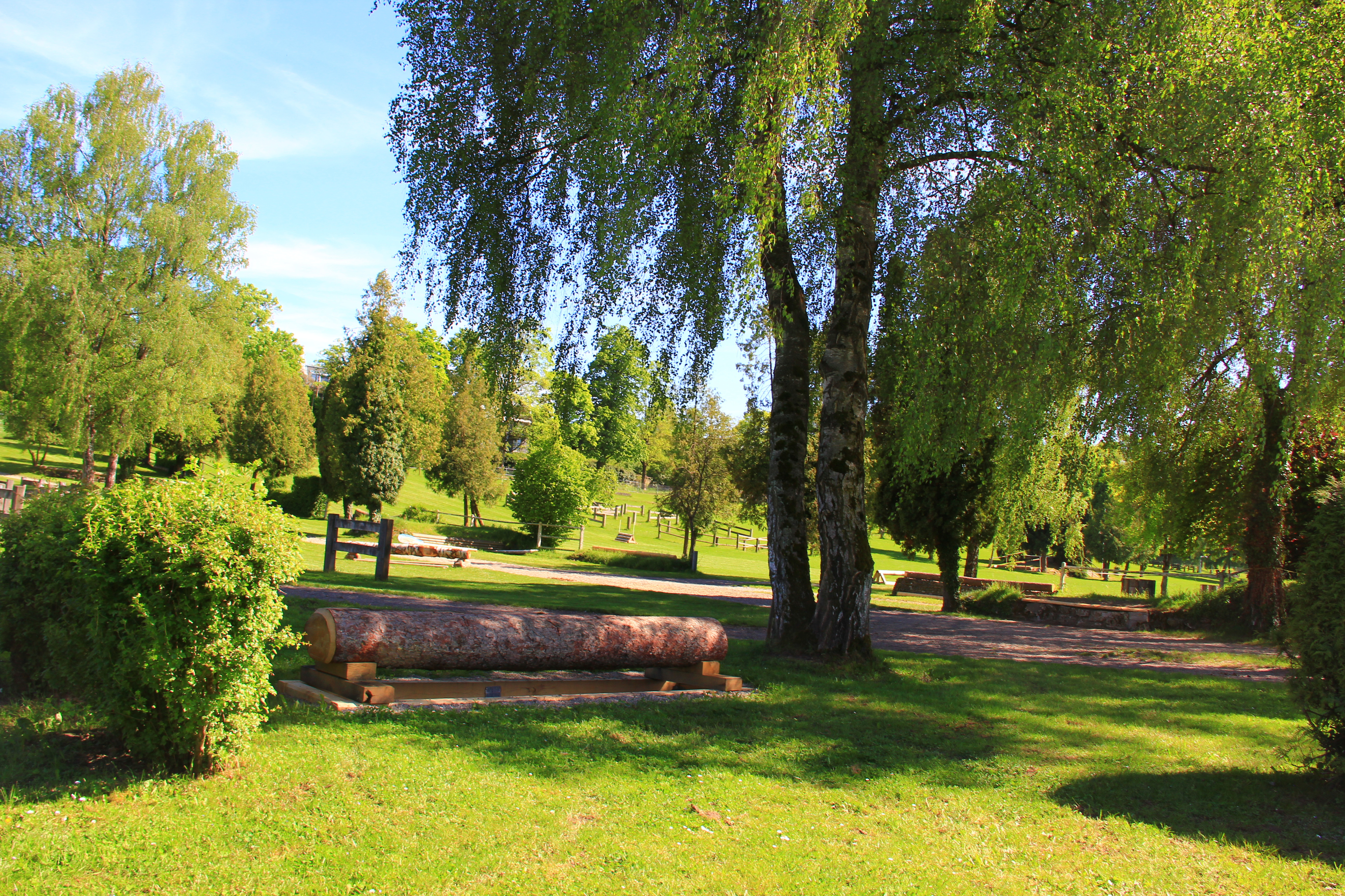 Springgarten des Nationalen Pferdezentrums Bern